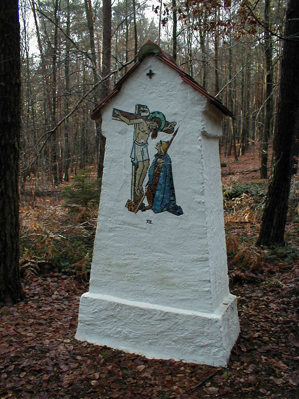 Kreuzweg am Erbig, Station XII, Gebetsstation auf einem Pilgerweg in der Nähe von Schweinheim